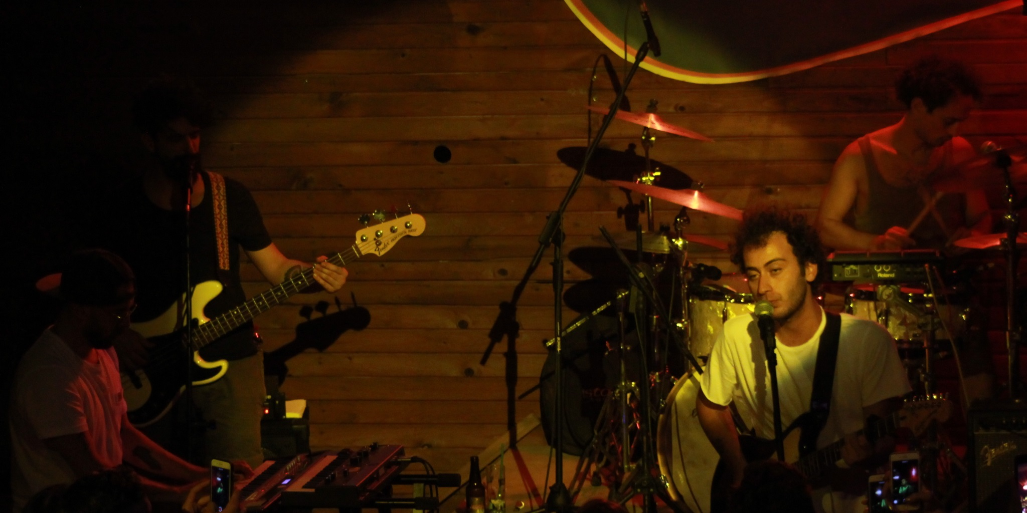 Yüzyüzeyken Konuşuruz, 17 Temmuz 2018 Olimpos, Antalya konserlerinde sahne verirken.